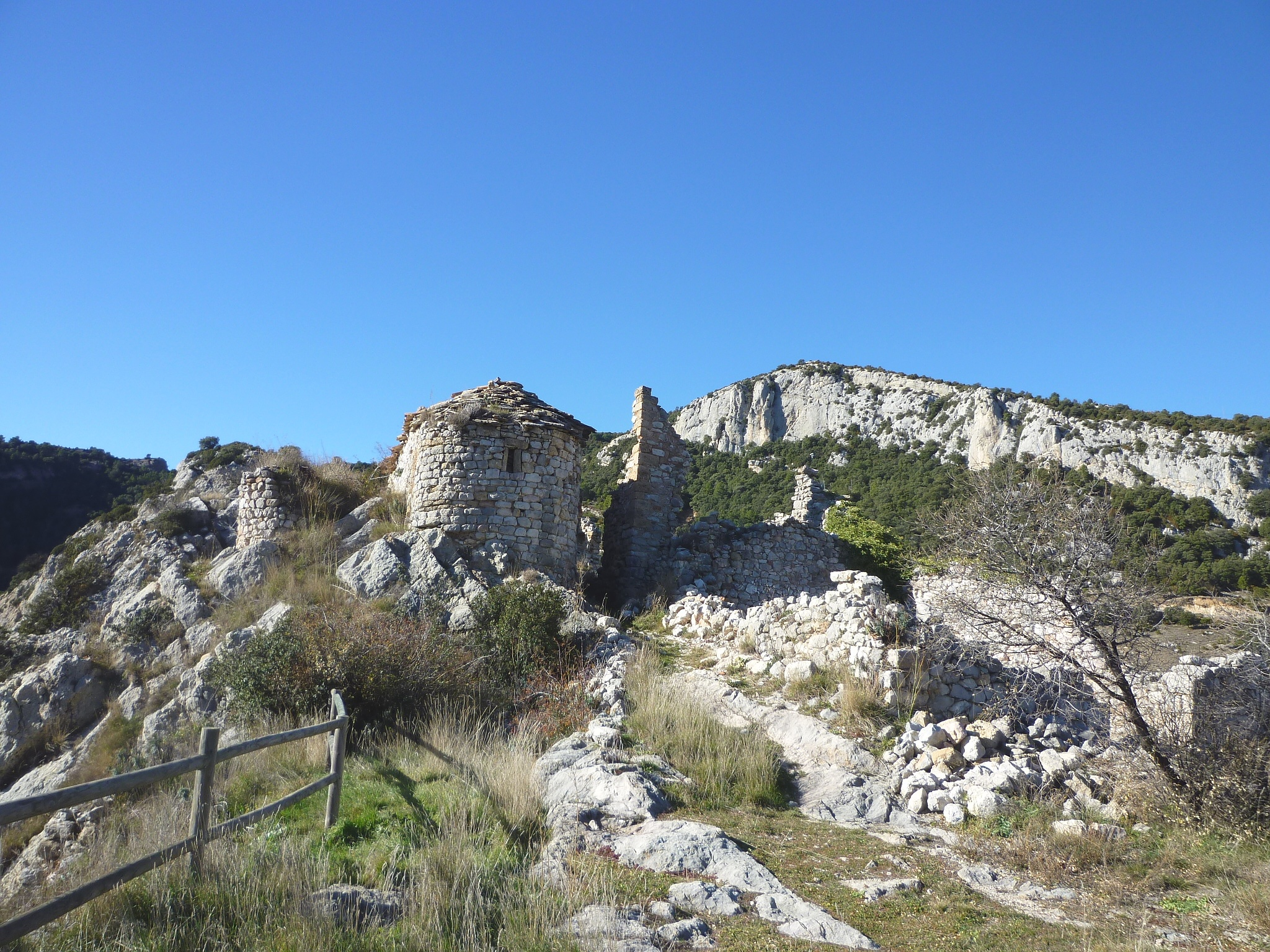 Castell de Cambrils (Odèn): Capella de la Mare de Déu del Remei